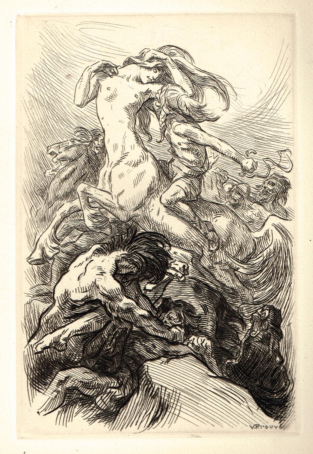 Gravure sur bois et sur cuivre de Victor Prouvé, illustration pour le roman d'André Lichtenberger "Les Centaures" dans la réédition parue chez Georges Crès en 1924. La centauresse Kadilda est capturée par l'humain Naram dans l'une des dernières scènes du roman.